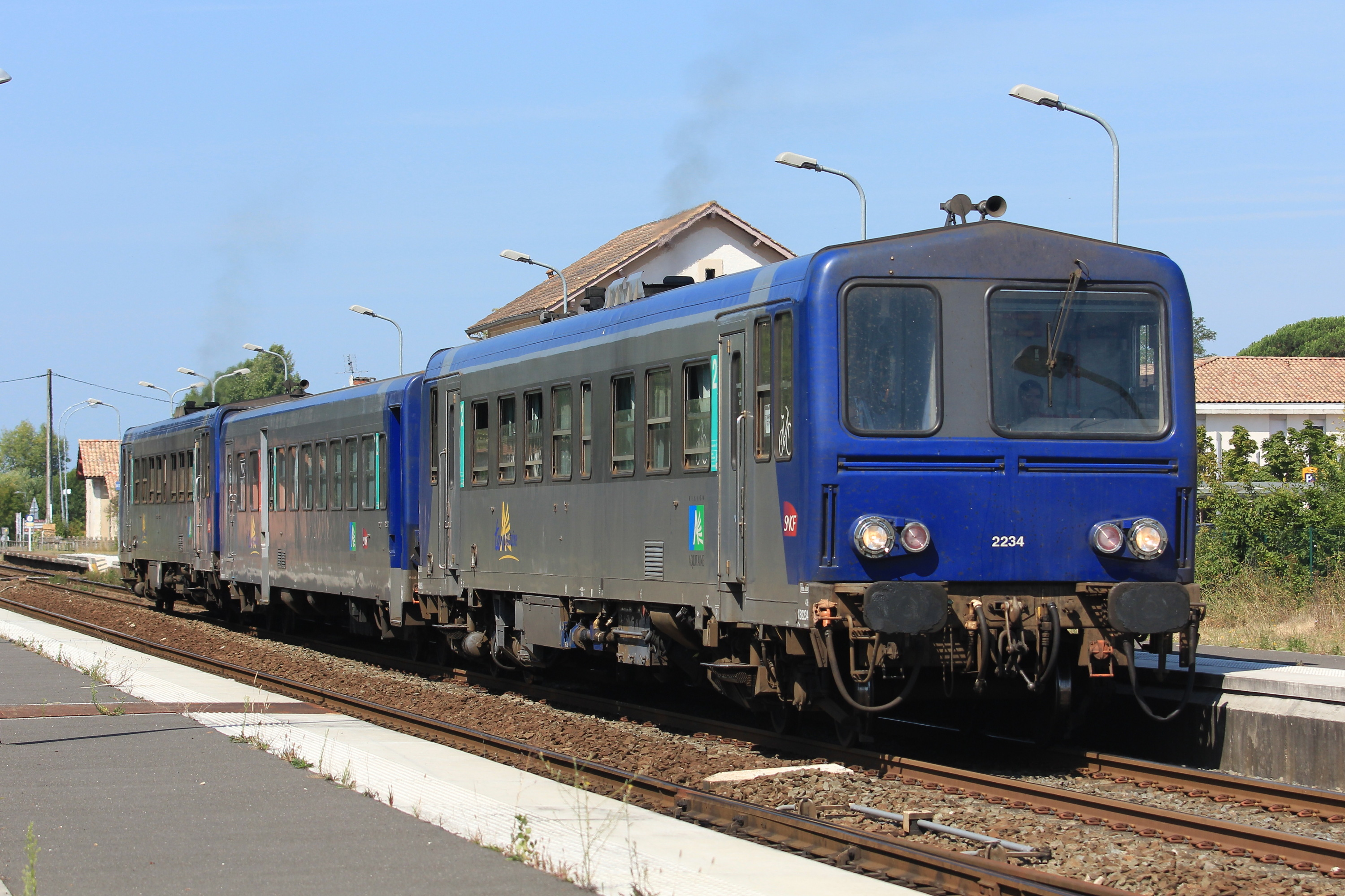 L'X 2234, une XR 6000 et un autre X 2200 redémarrent de la gare de Saint-André-de-Cubzac sur le TER 865122 (Bordeaux-Saint-Jean - Saint-Mariens - Saint-Yzan).